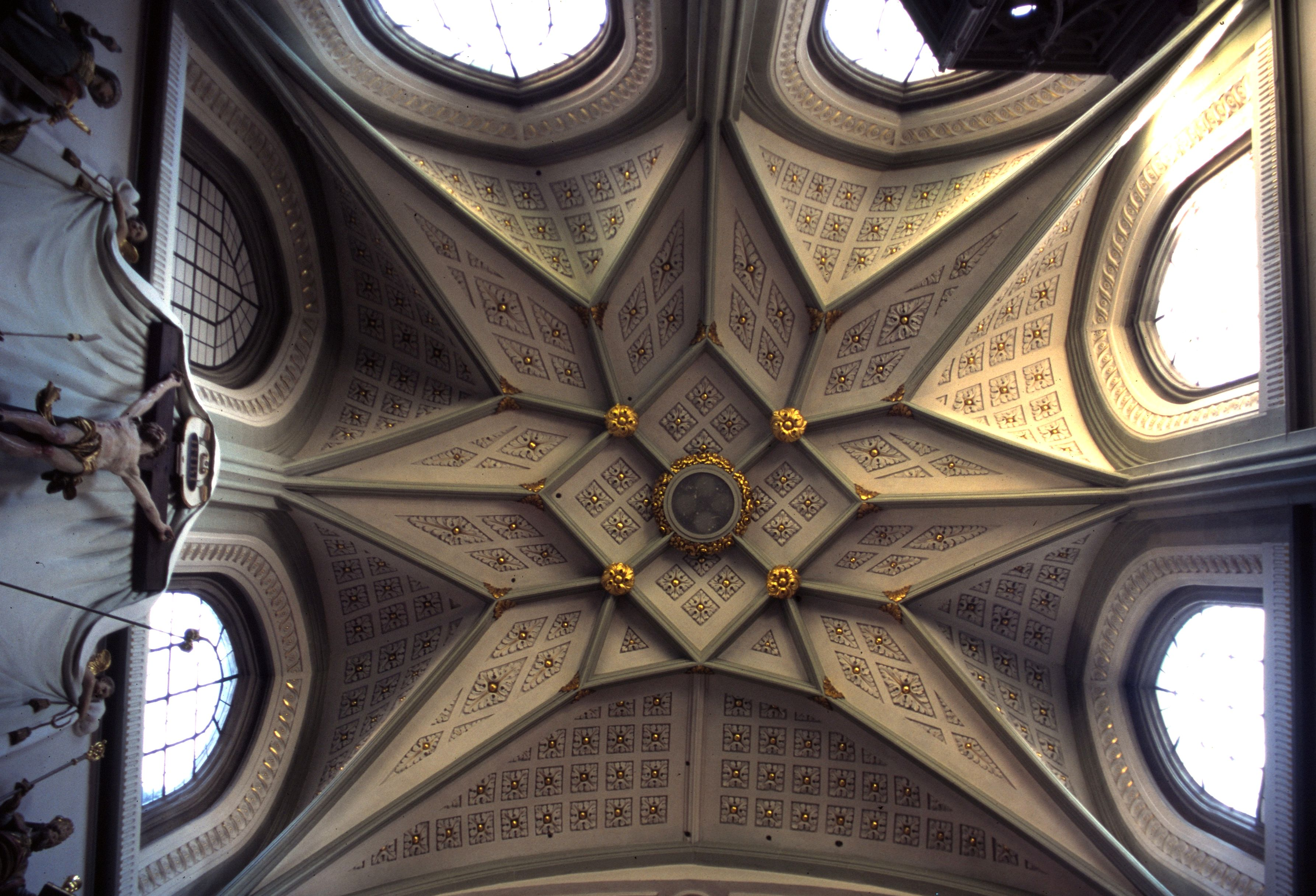 Gewölbe im Konstanzer Münster